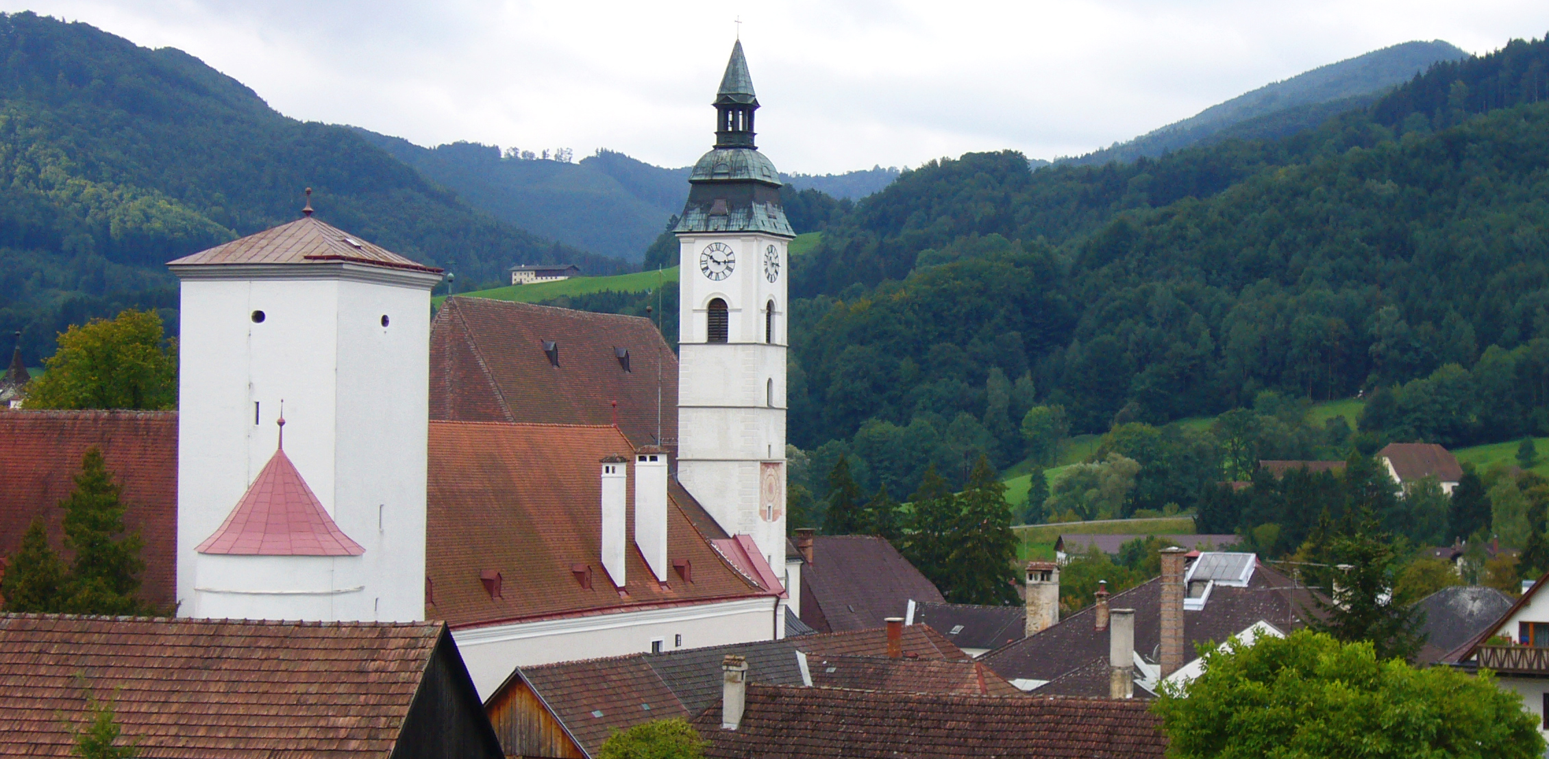 scheibbs